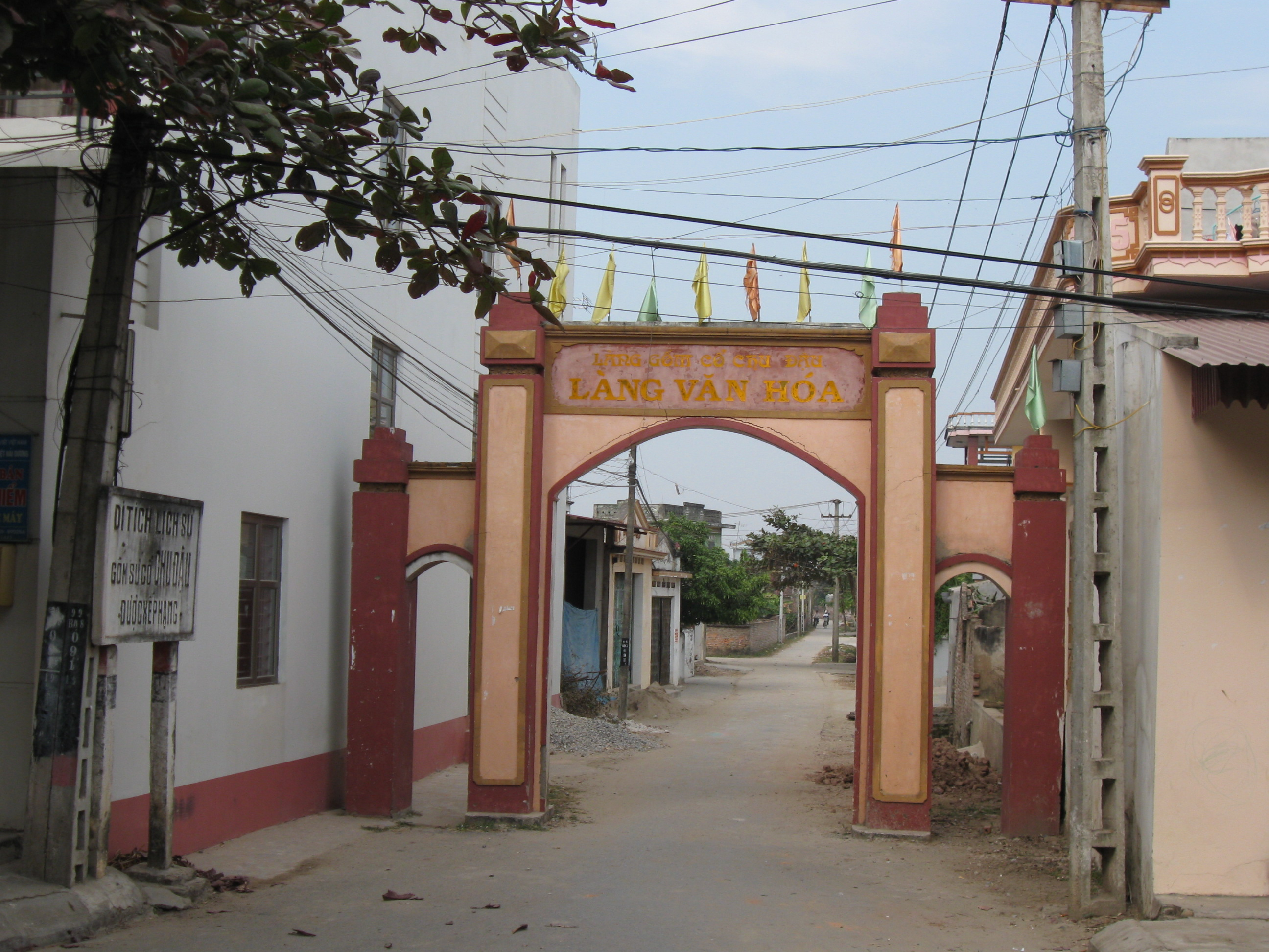 Hình tự chụp bởi Bigland